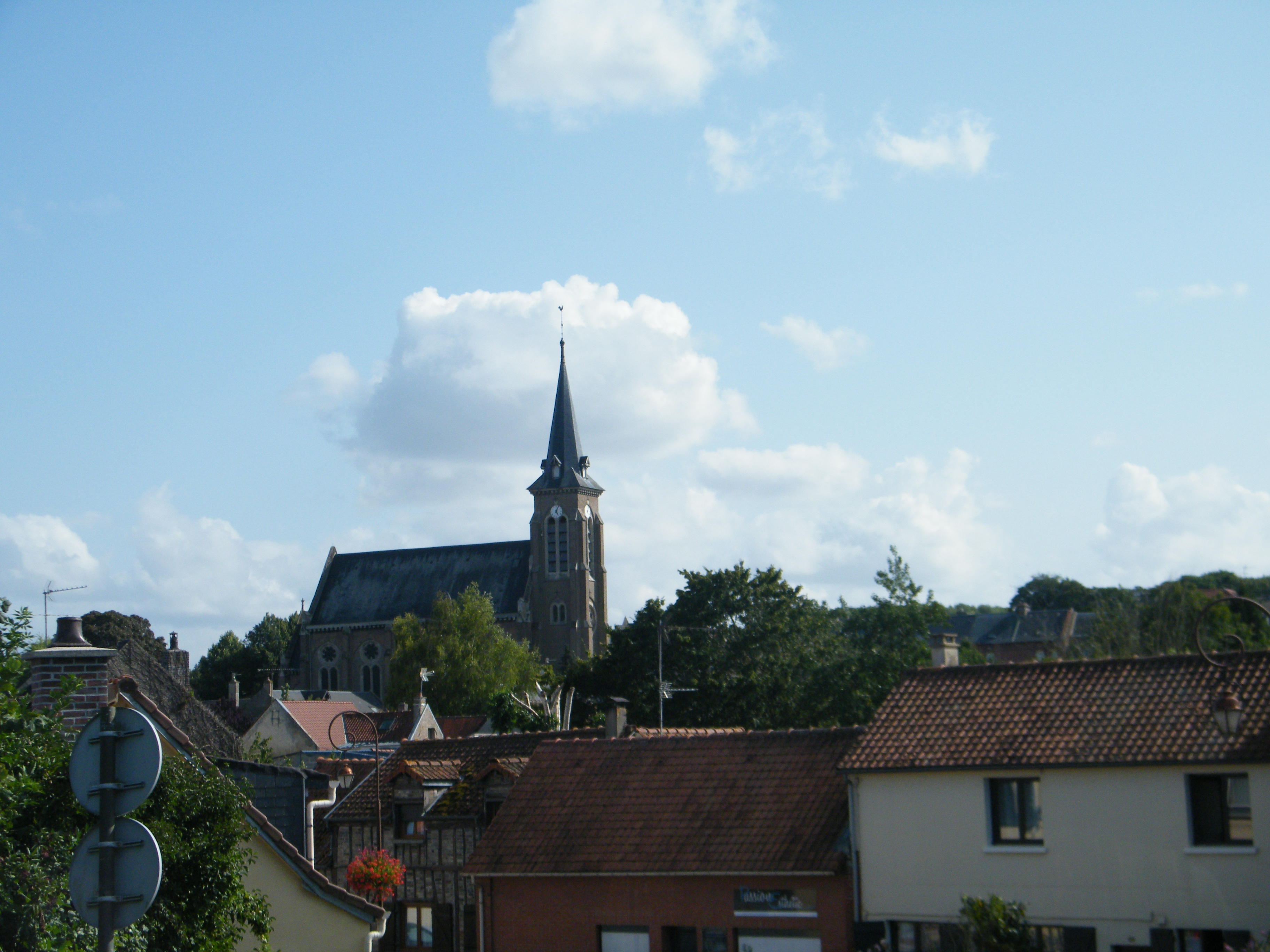 Dreuil, Somme, France, église.